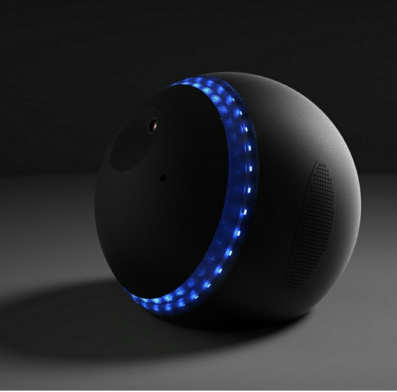 Робот-помощник Лекси